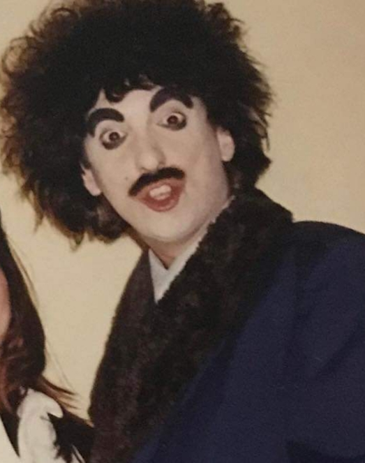 Koke Corona antes de una de sus presentaciones en abril del 2003, Koke Corona ya estaba personificando al popular "Loco Hugo" de Bienvenidos